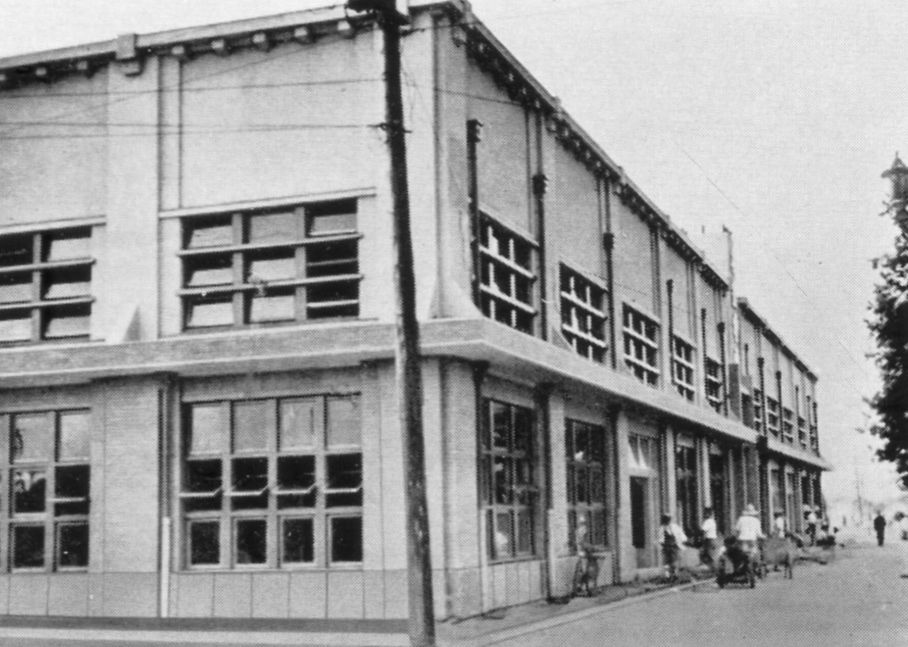 16年8月の開業を目指し外装を終わった駅舎